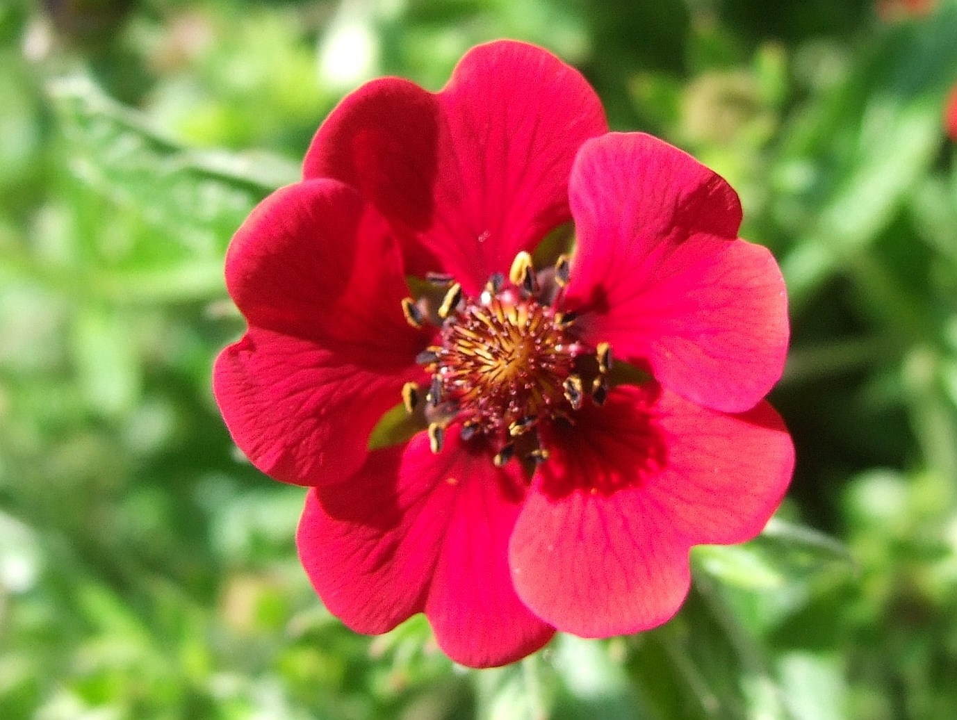 Potentilla atrosanquinea (pl. pięciornik krwisty)